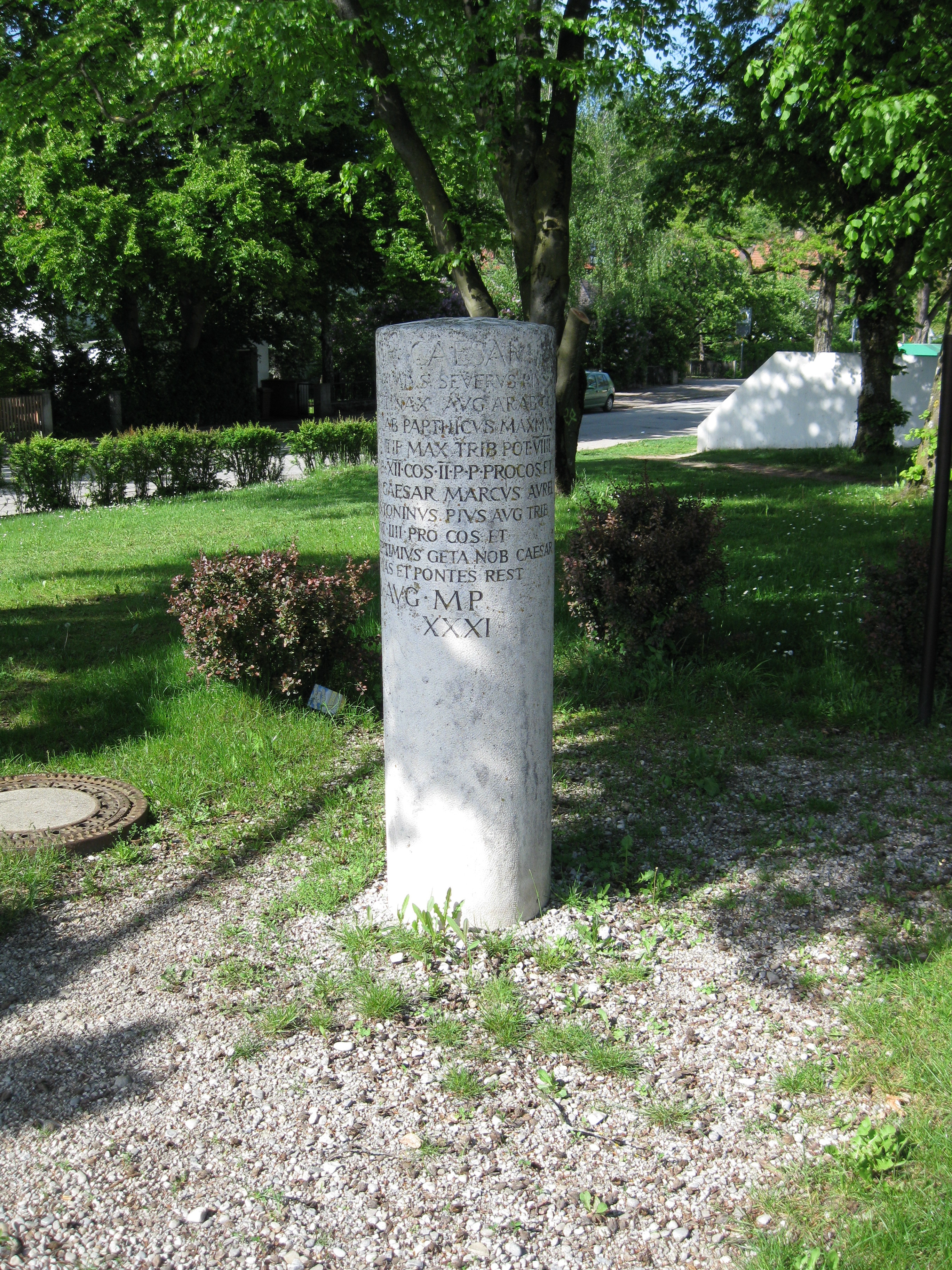 Römersäule in Gilching, Bayern.(Kopie, wiederaufgestellt) XXXI ist im Original XXXXI